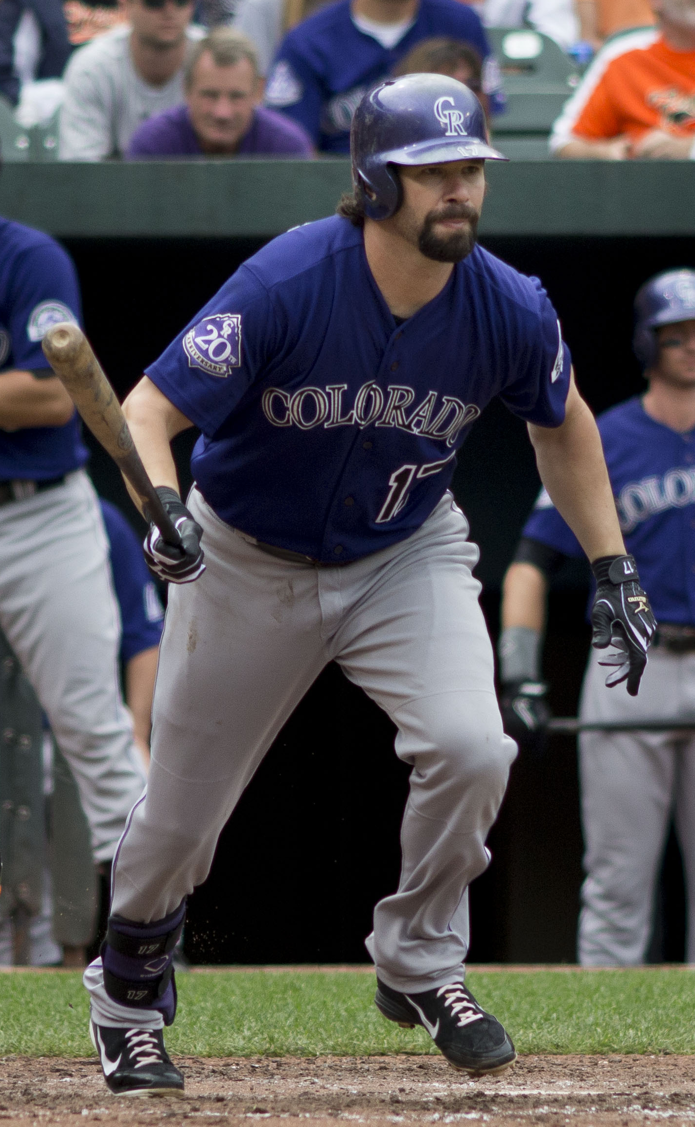 Todd Helton